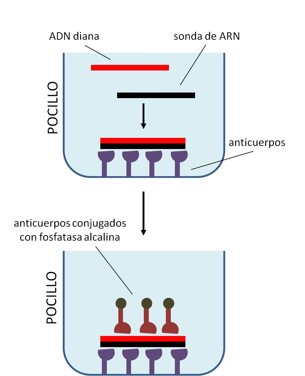 Ensayos de captura de híbrido.